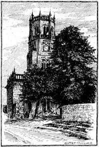 Kirche Unterfarnstädt